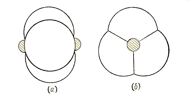 Орбиталь тройной связи